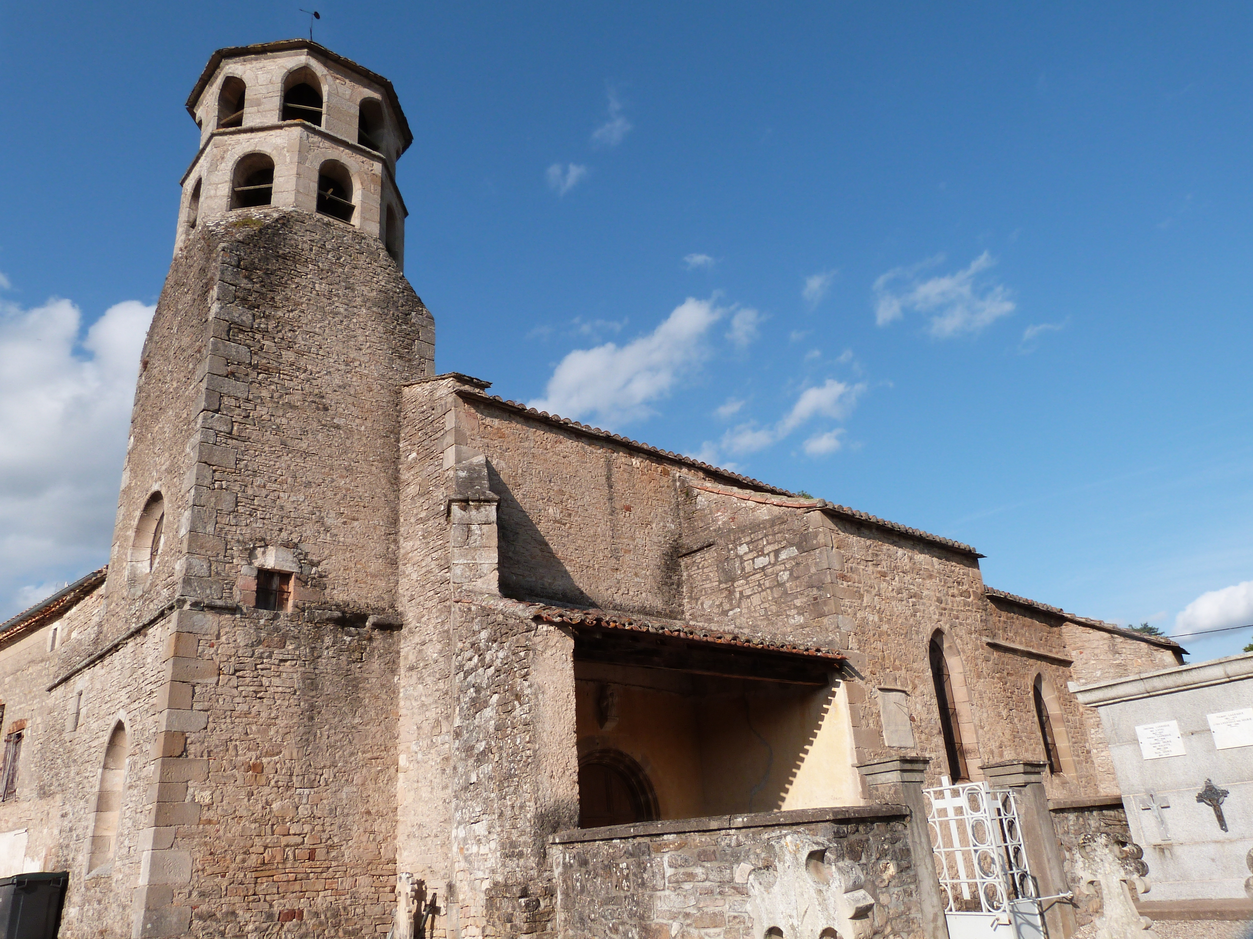 Église Saint-Martin de Vindrac-Alayrac .